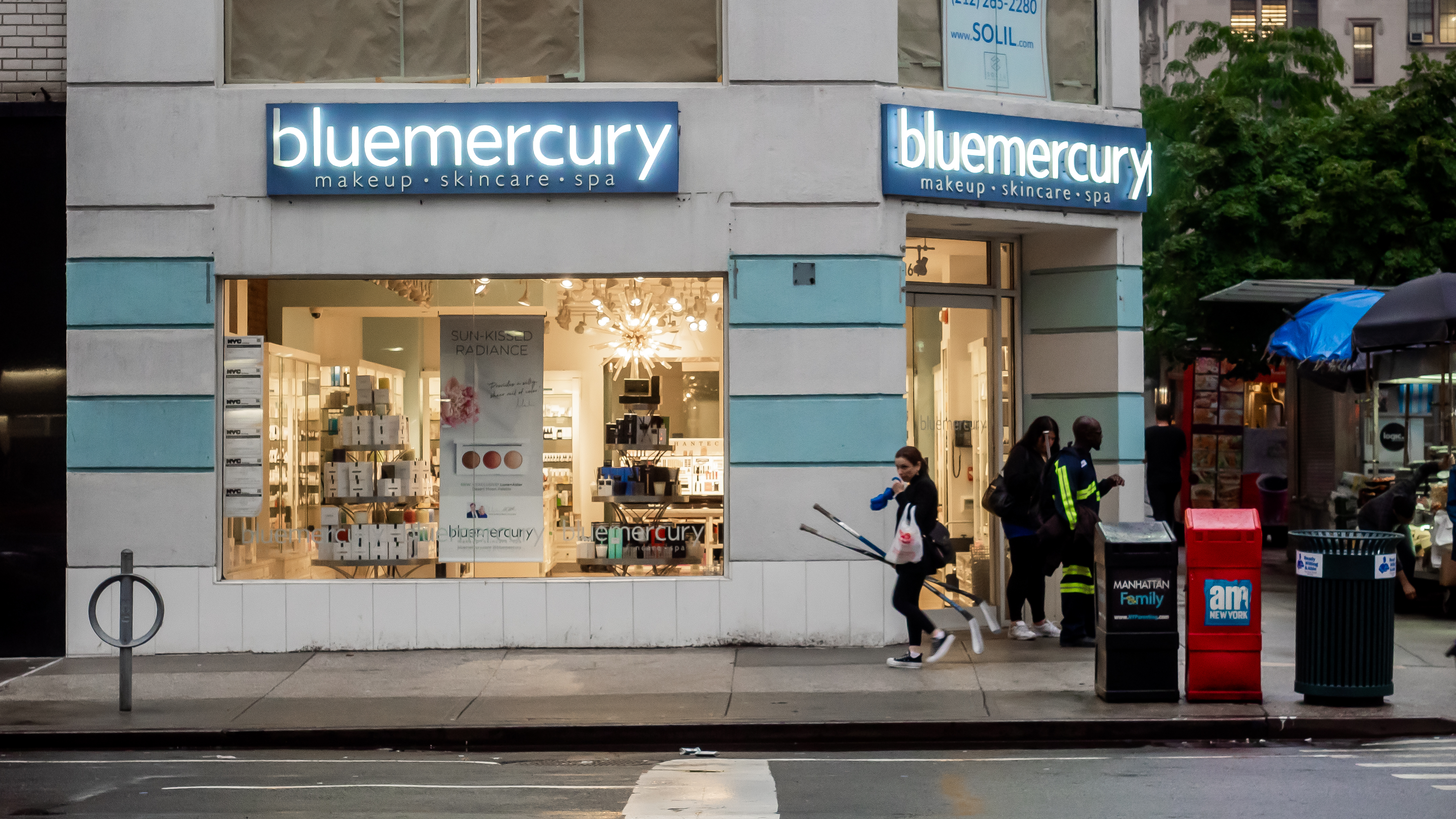 Upper East Side, NYC